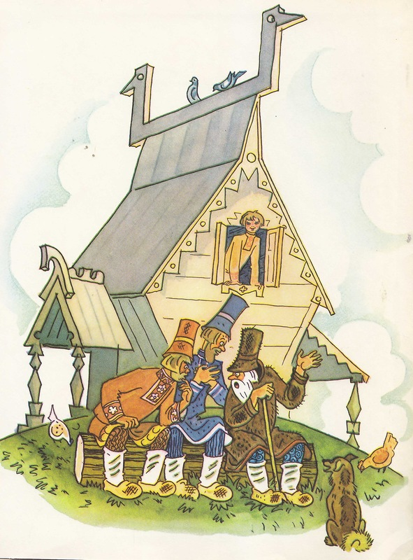 Иллюстрация к сказке "Конек Горбунок". Художник Д. А. Брюханов